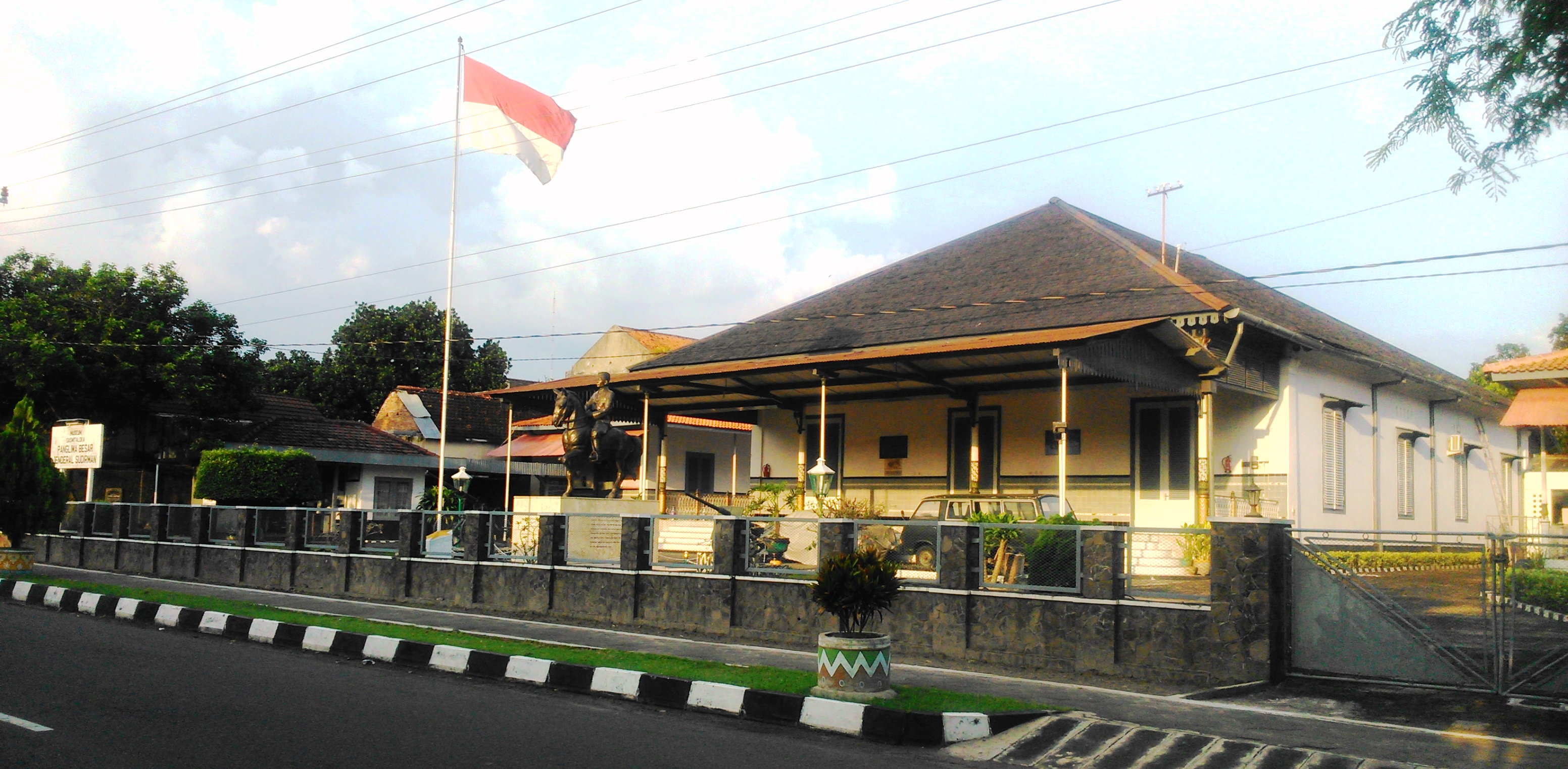 Museum Sasmita Loka Jendral Sudirman, Yogyakarta